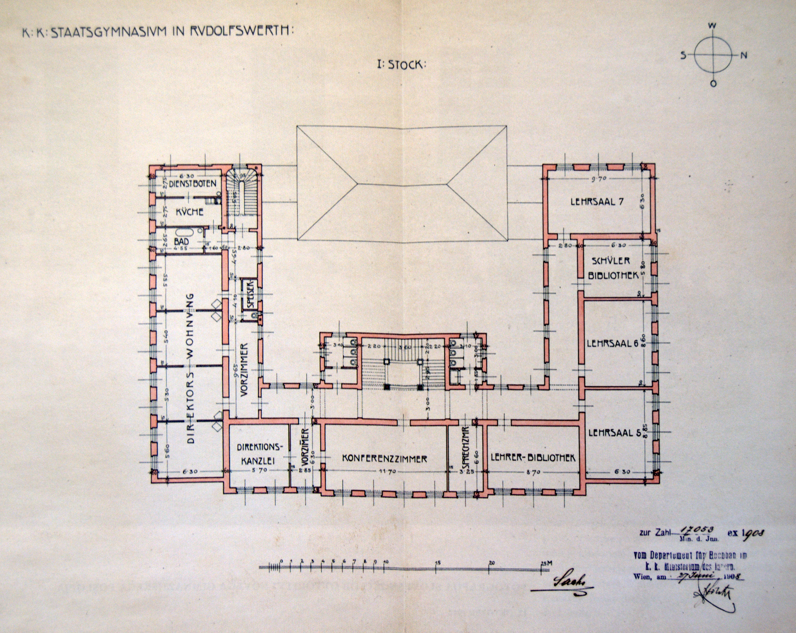 Načrt prvega nadstropja novega poslopja.